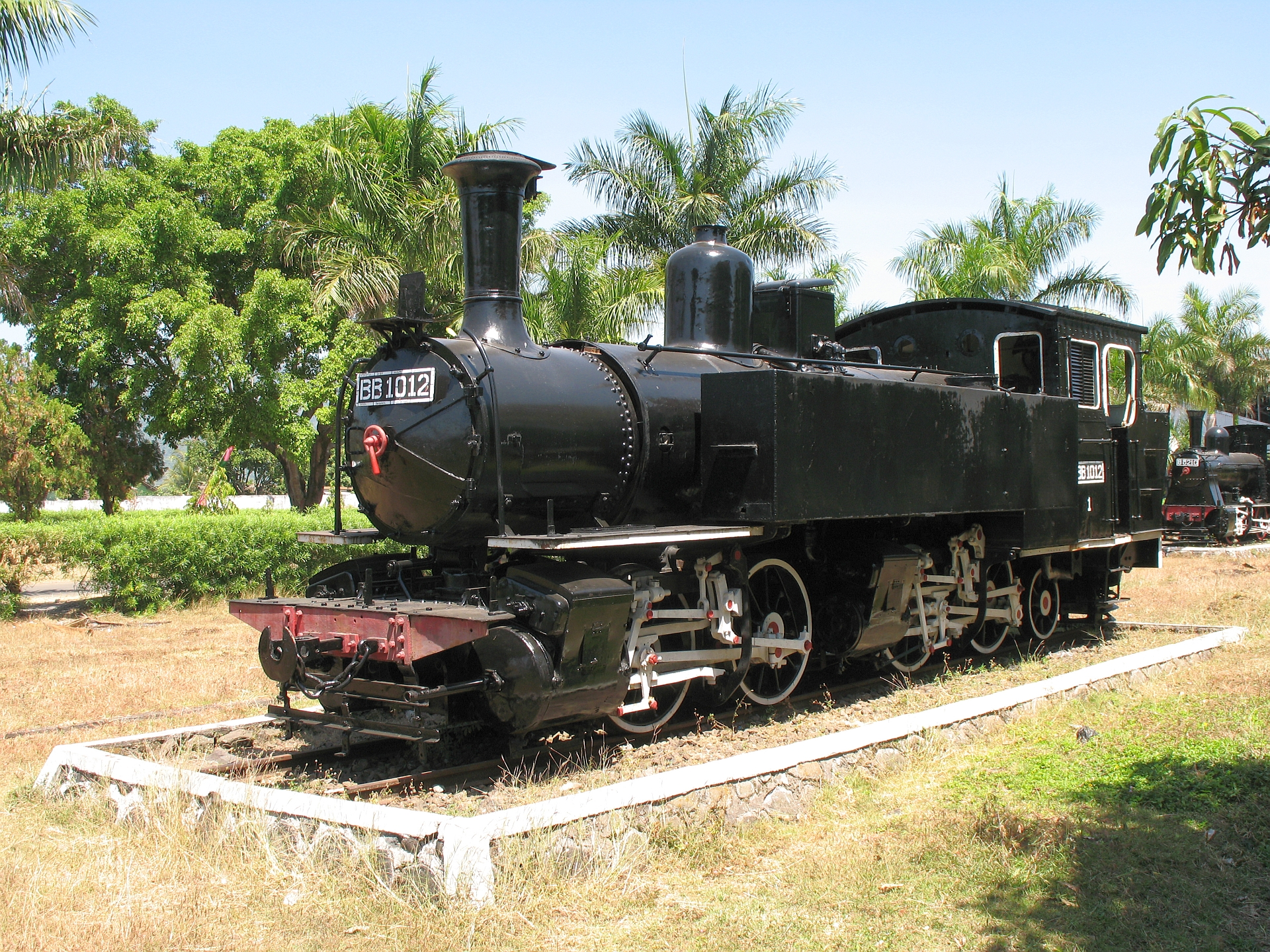 DKA BB10 (10 12 A)